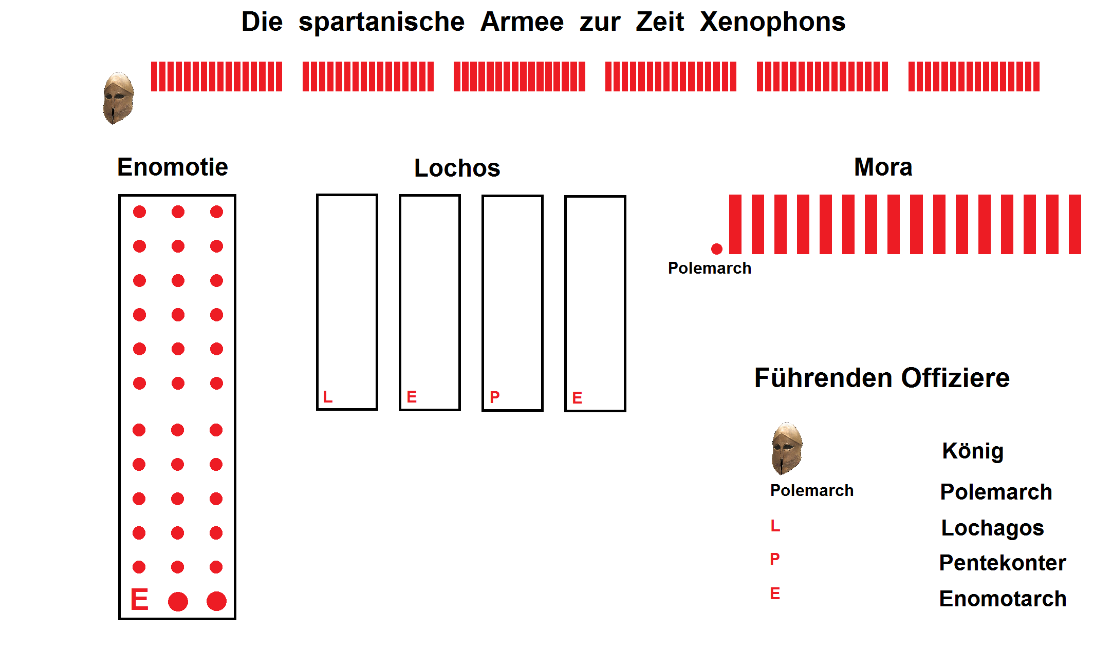 Darstellung der Organisation der spartanischen Armee wie beschrieben bei Xenophon